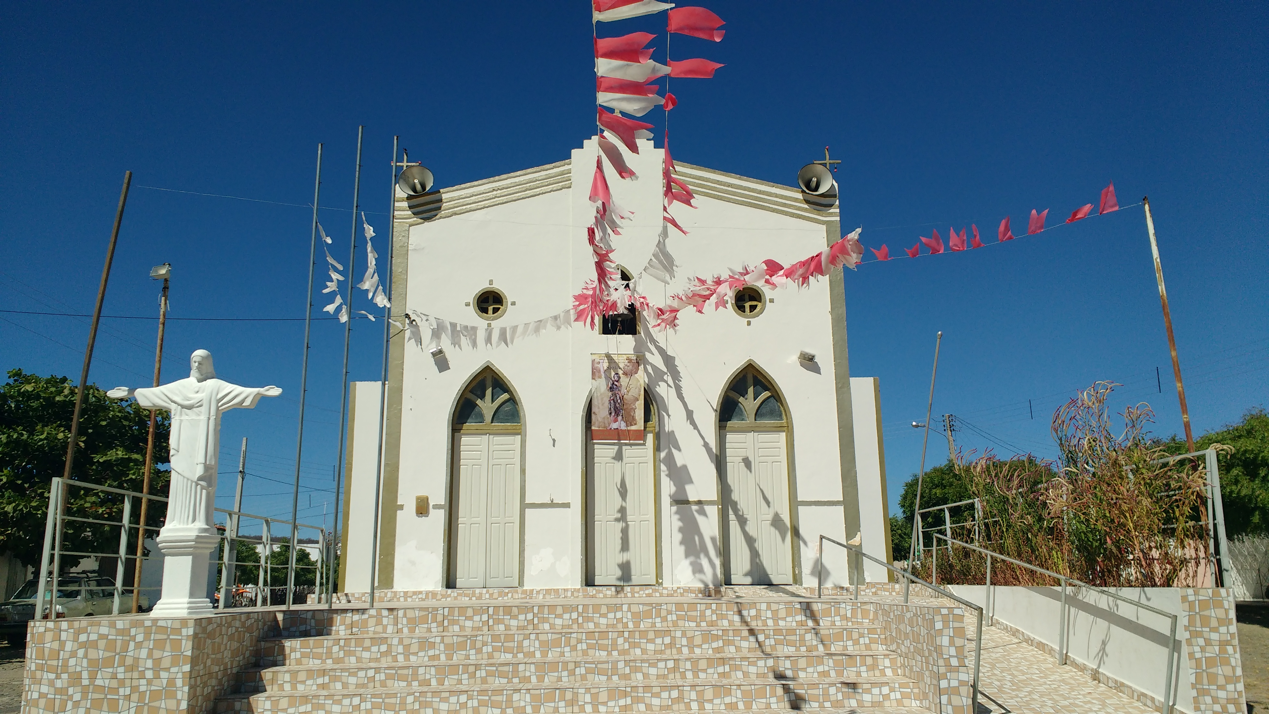 Capela de São João Batista, da Paróquia de Sant'Ana de Luís Gomes - Vila Caiçara, Paraná, Rio Grande do Norte (Brasil).